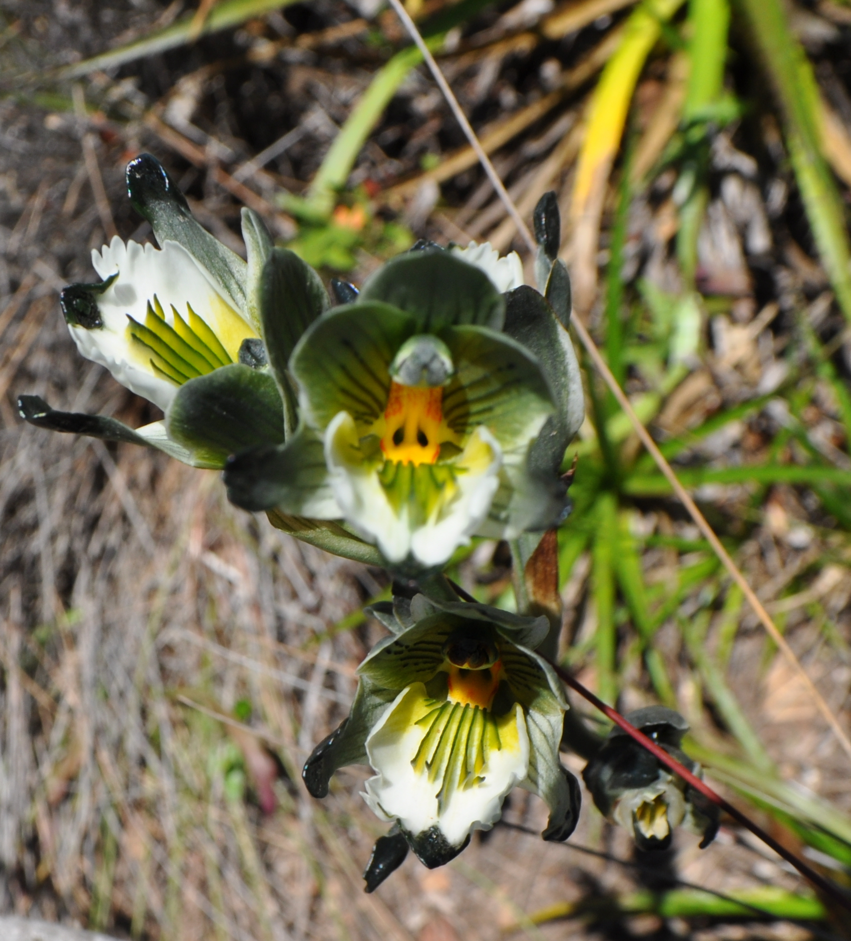 Chloraea bletioides. Orquídea endémica de Chile con una distribución desde el sur de la Región de Coquimbo hasta Concepción. Imagen captada en diciembre, en su límite boreal, formando parte del nivel herbáceo del bosque relicto del Cerro Santa Inés IV Región de Coquimbo, Chile.